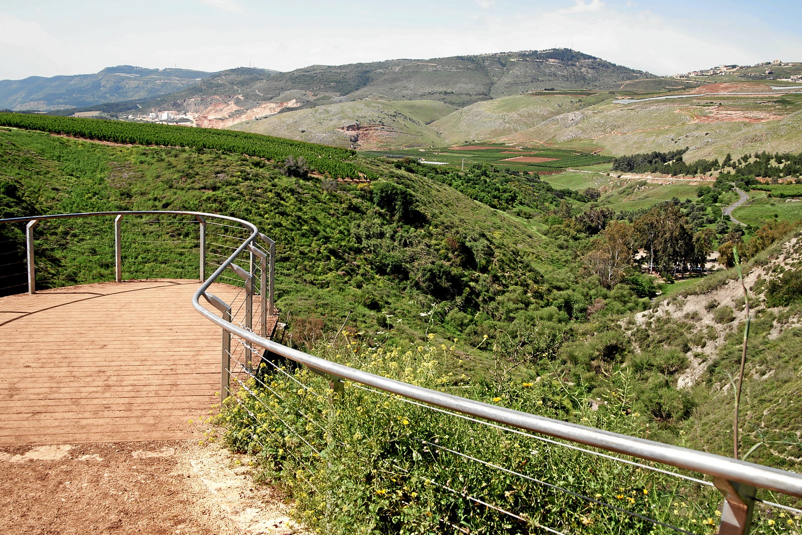 Ayun / Iyon Nature Reserve: Panorama